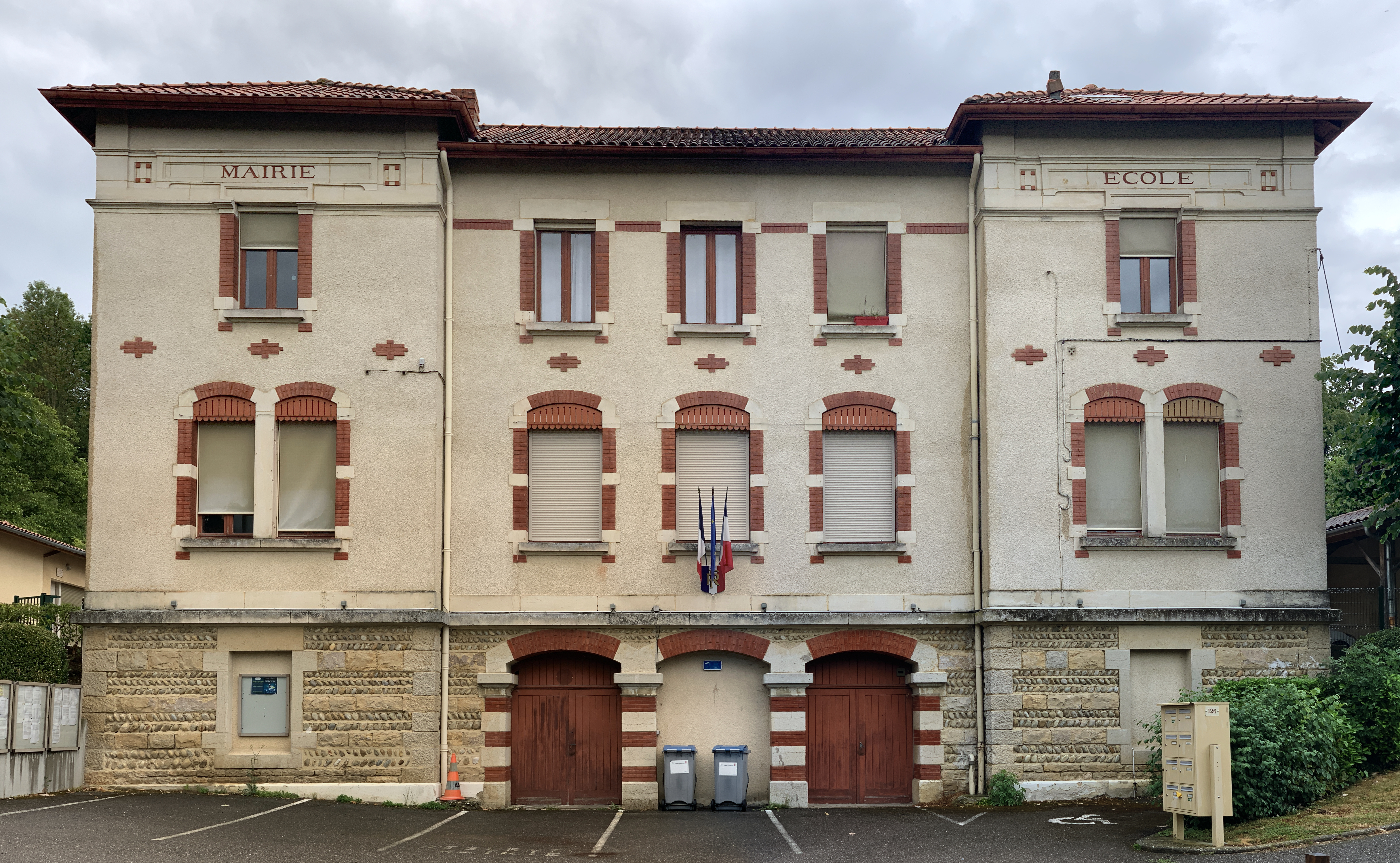 Mairie de Sainte-Croix, Ain.